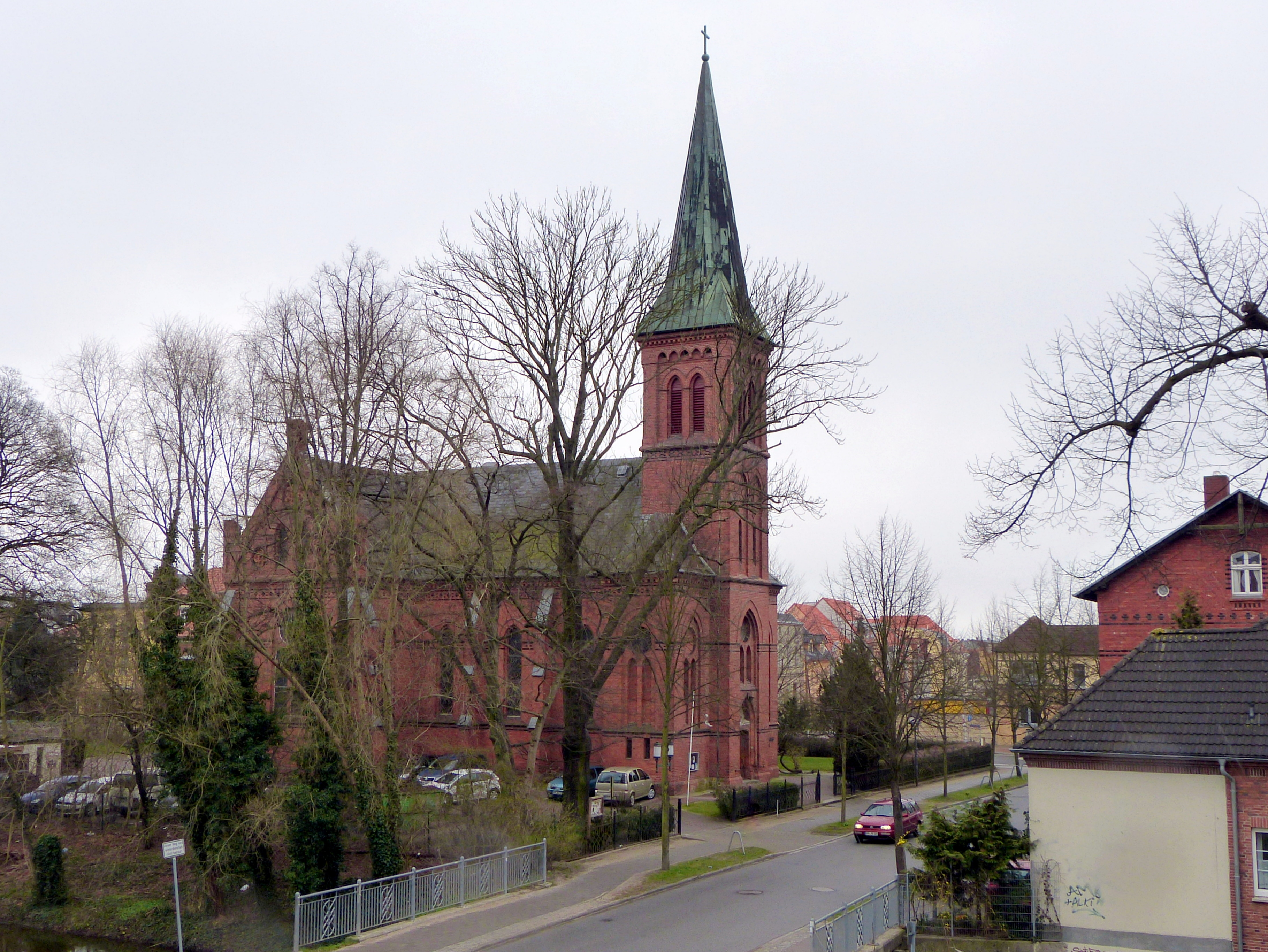 Greifswald, Katholische Kirche St.-Joseph, vom Stadtwall aus gesehen